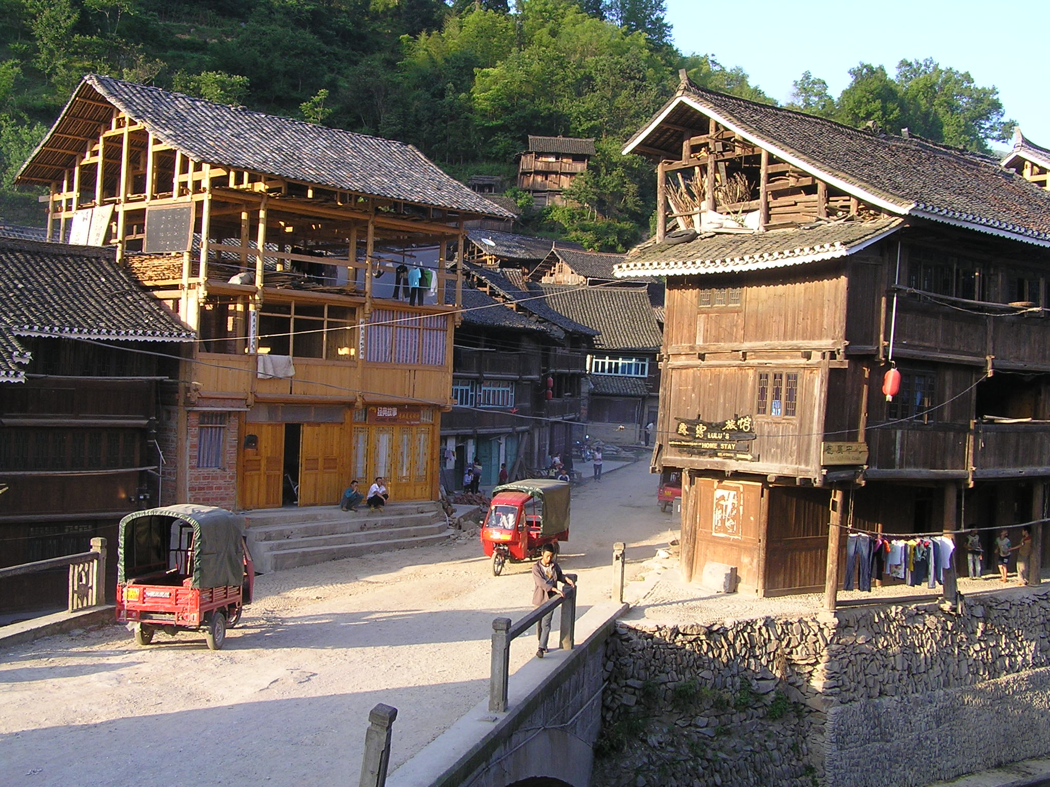 Zhaoxing